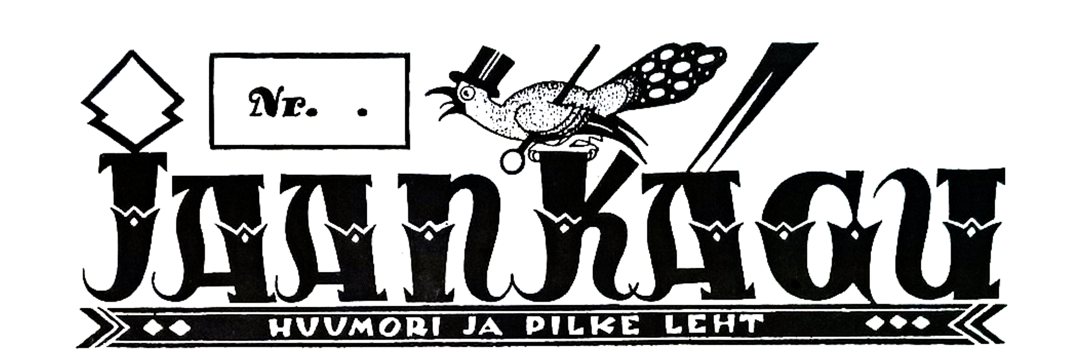 Ajalehe Jaan Kägu päismik